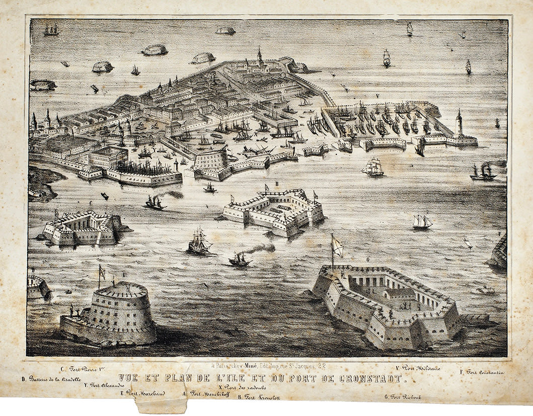 Кронштадт 1854 года